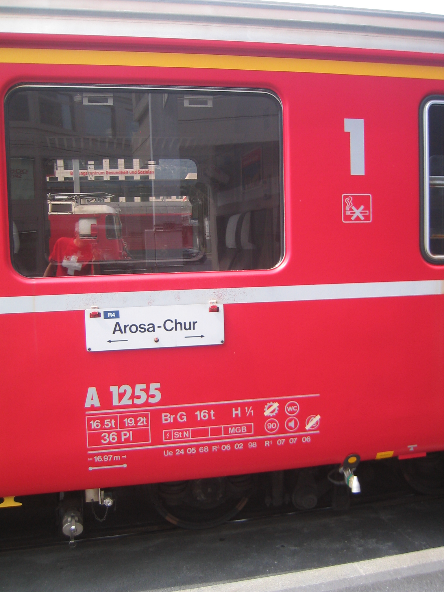 RhB Zugsbeschilderung